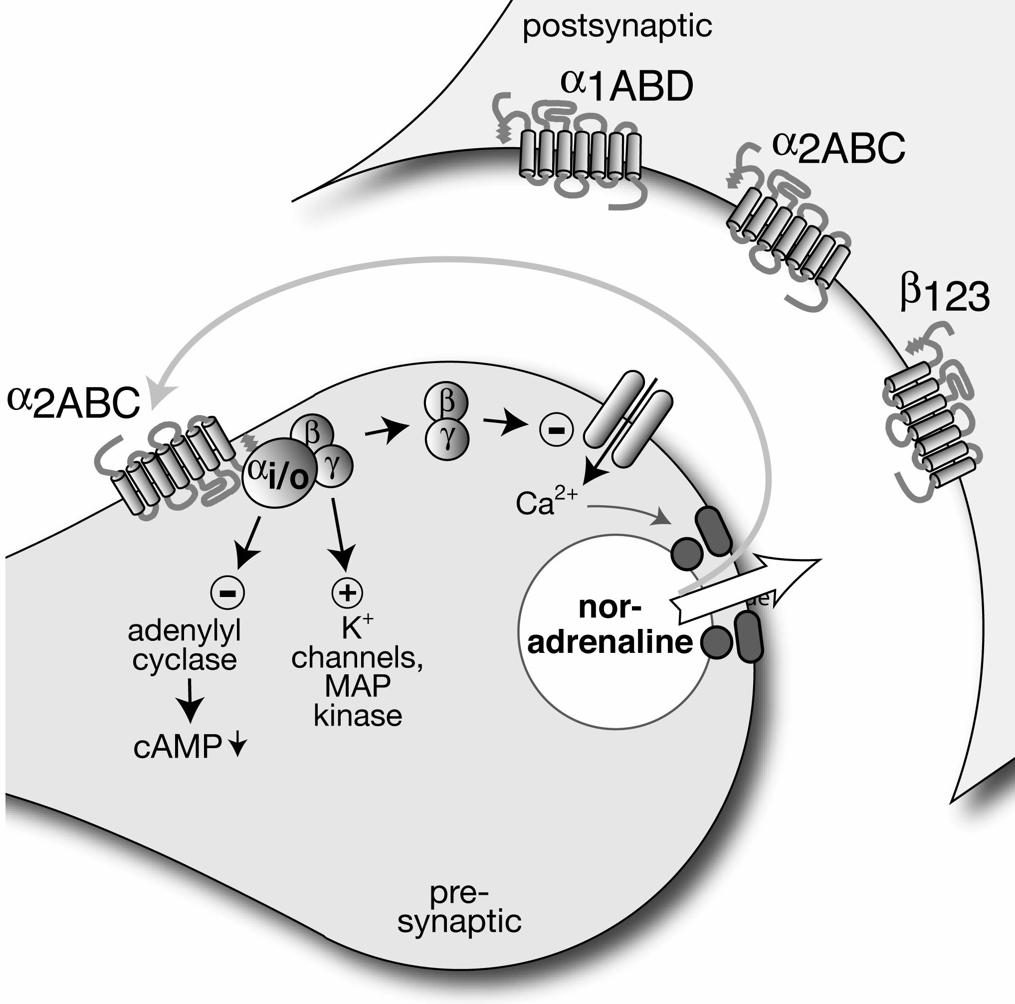 Schema eines Autorezeptors